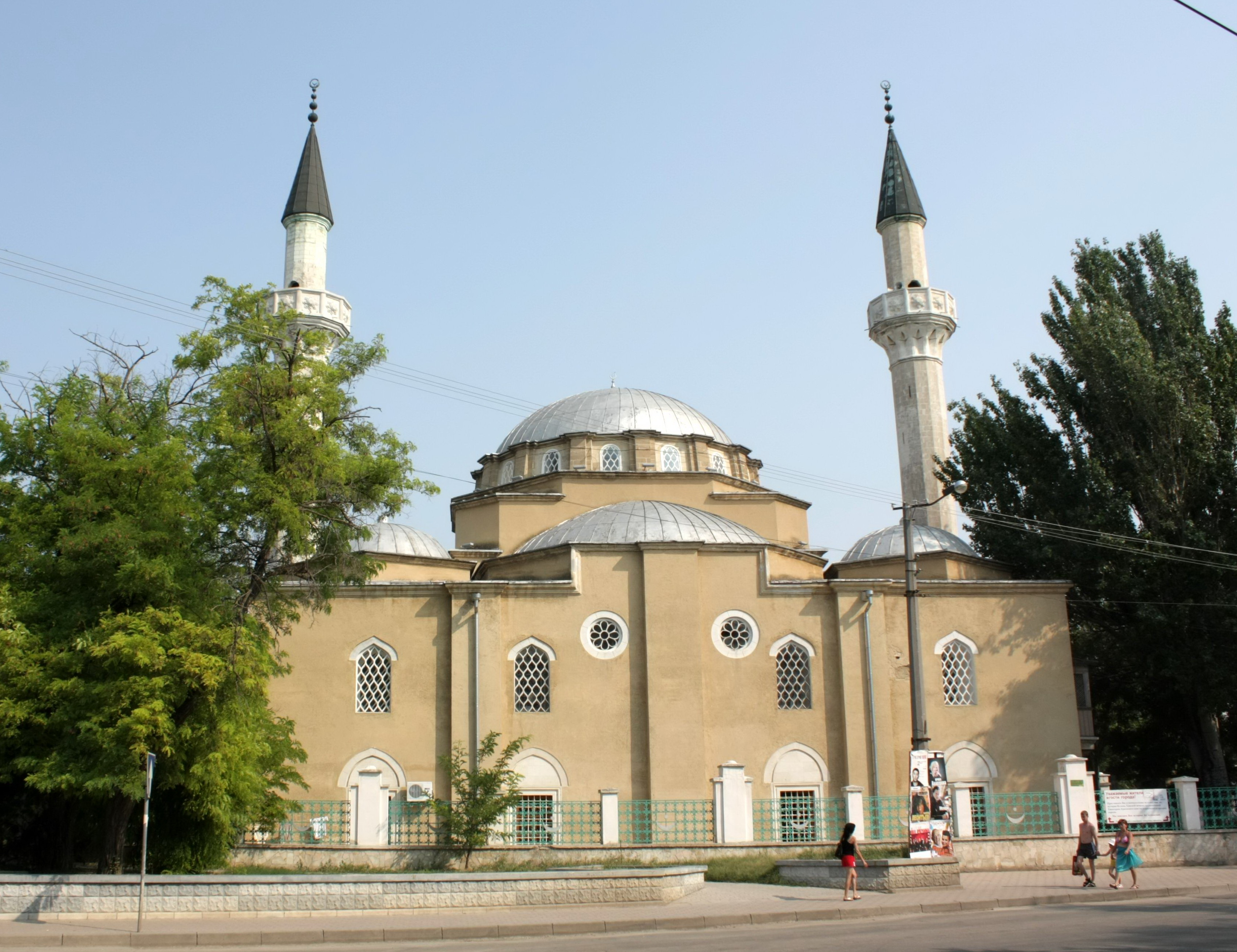 Євпаторія